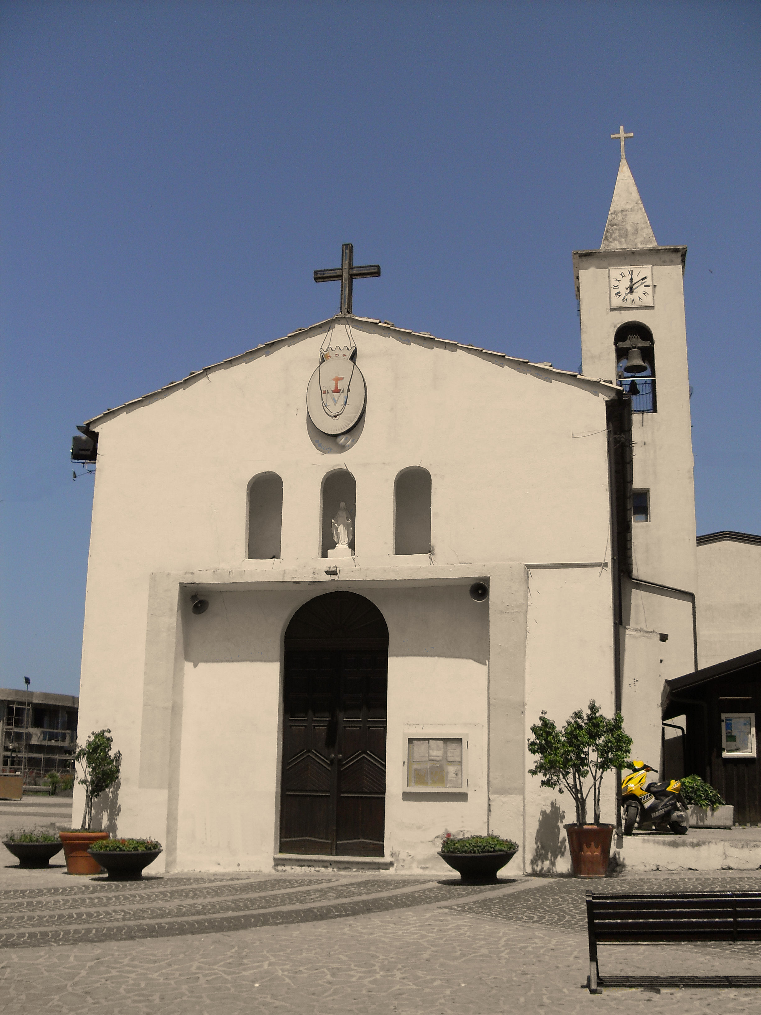 Io sottoscritto Luigi Salvatore Vadacchino, utente di Wikipedia sotto il nome di Lodewijk Vadacchino, cedo l'immagine SDC11098.JPG a Wikimedia Italia, sotto licenza CC-BY-SA, con il nome Campora_San_Giovanni-ChiesaSanPietroApostolo2009.jpg. L'Immagine fotografica raffigura la Chiesa di San Pietro Apostolo della mia cittadina natale di Campora San Giovanni. Porgo come sempre i miei distintissimi saluti, con l'augurio che possiate venirmi a far visita.--21:18, 10 dic 2009 (CET)